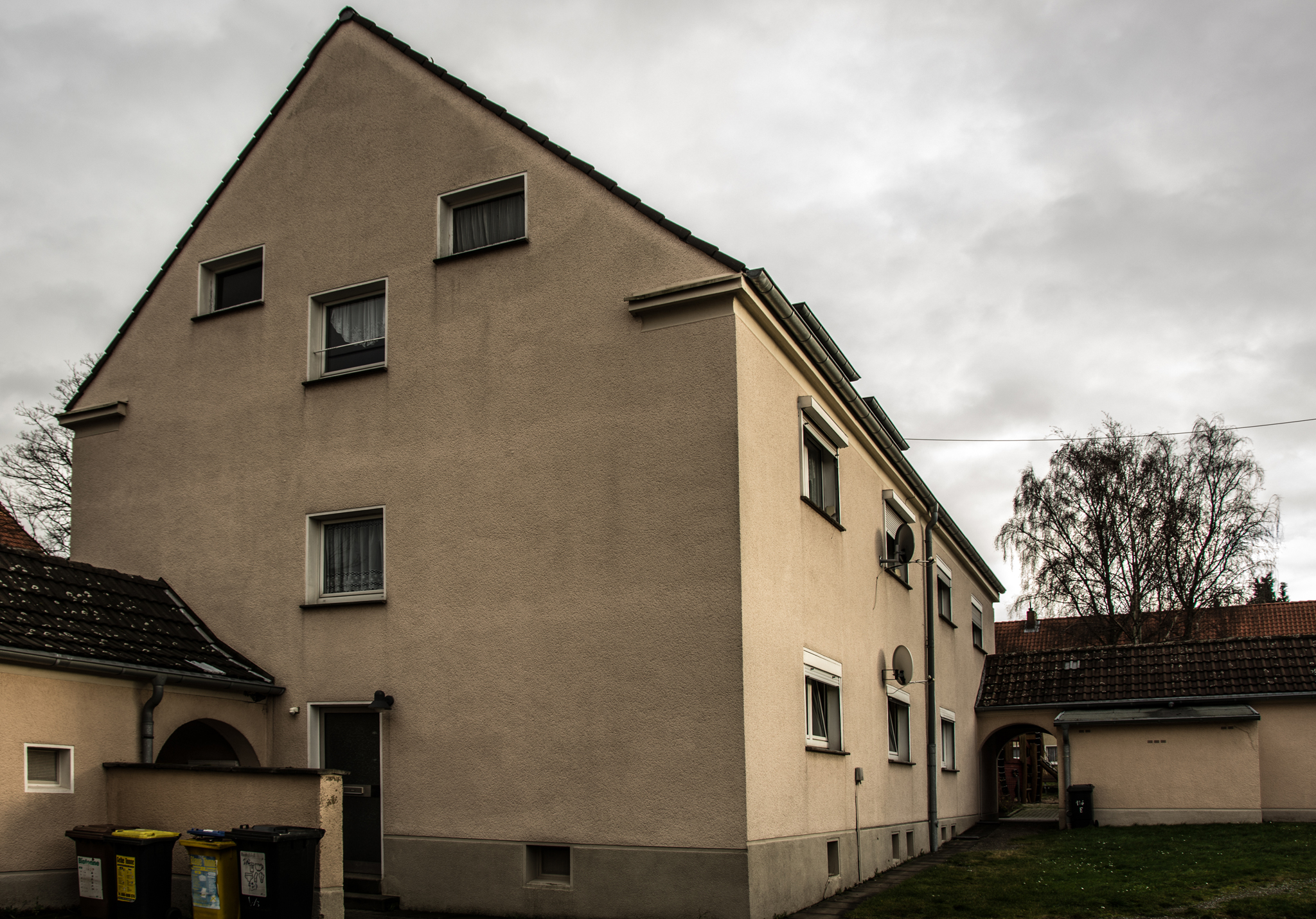 Wohnhaus eines Opfers des Naziterrors